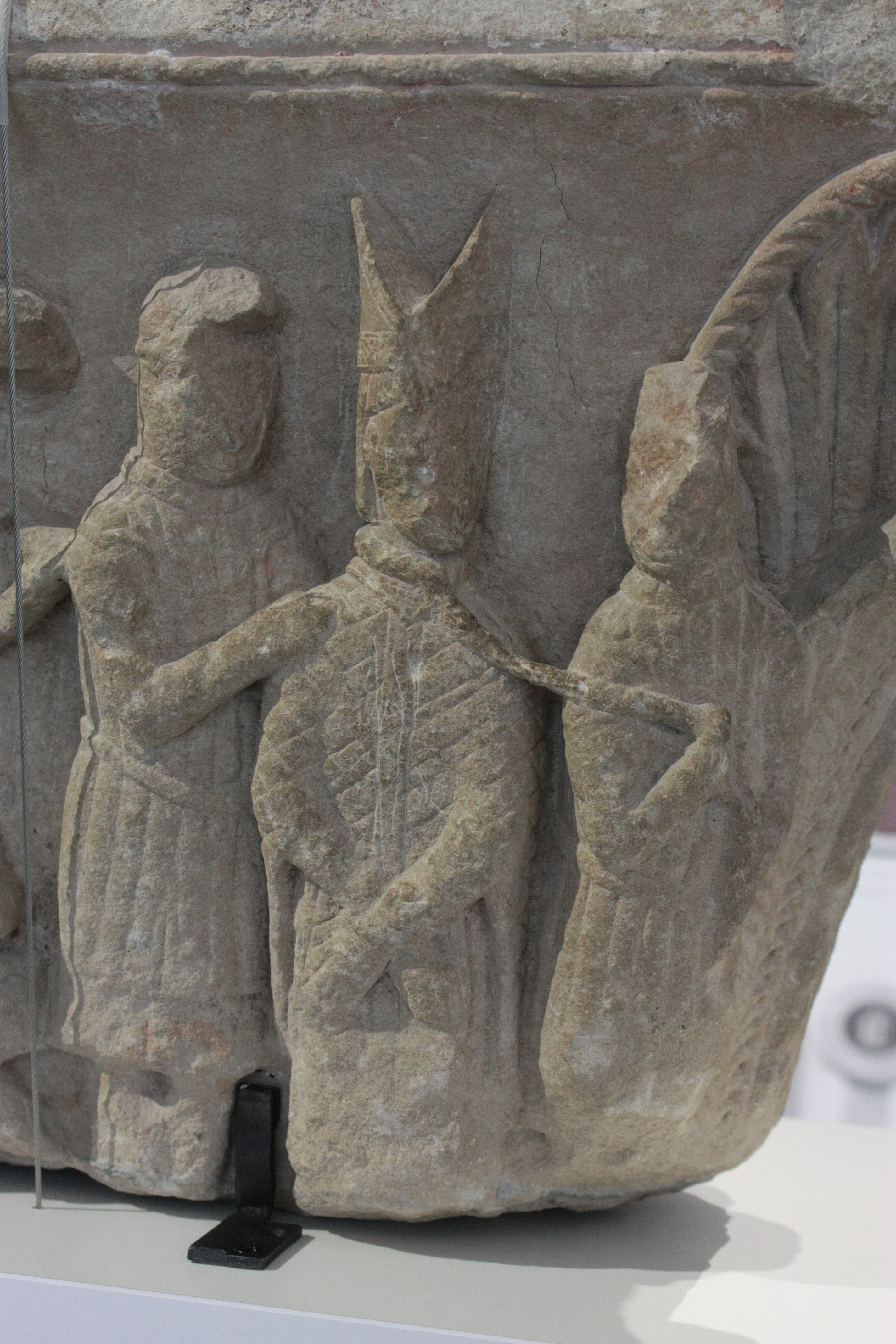 Chapiteau historié, scène de bataille évoquant la légende de Saint Volusien, évêque de Tours. Pierre calcaire sculptée, Fin du XIIe siècle. Inv. 989-1-77. Musée départemental de l'Ariège.